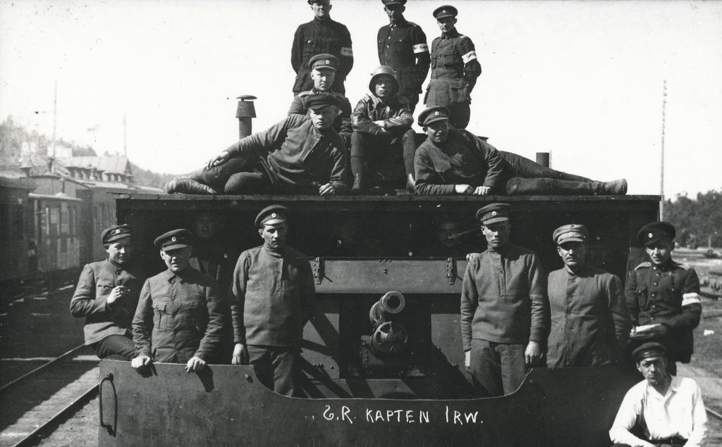 Soomusrongi "Kapten Irv" suurtükiplatvorm "Pisuhänd" koos meeskonnaga (suvi 1919)